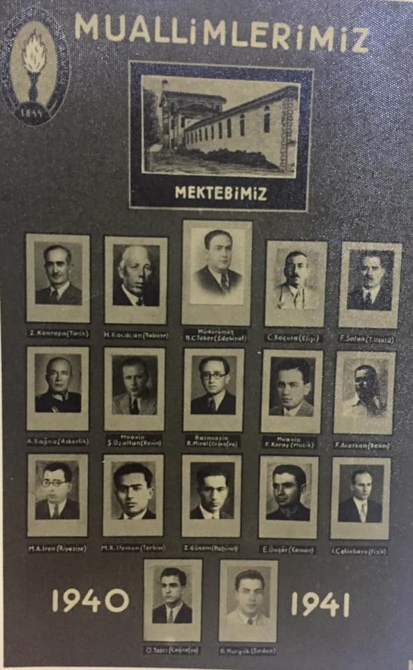 Ekrem Zeki Ün(gör) 1940-1941 Dönemi İstanbul Erkek Öğretmen Okulu Öğretmenleri arasında E. Üngör ( Keman )